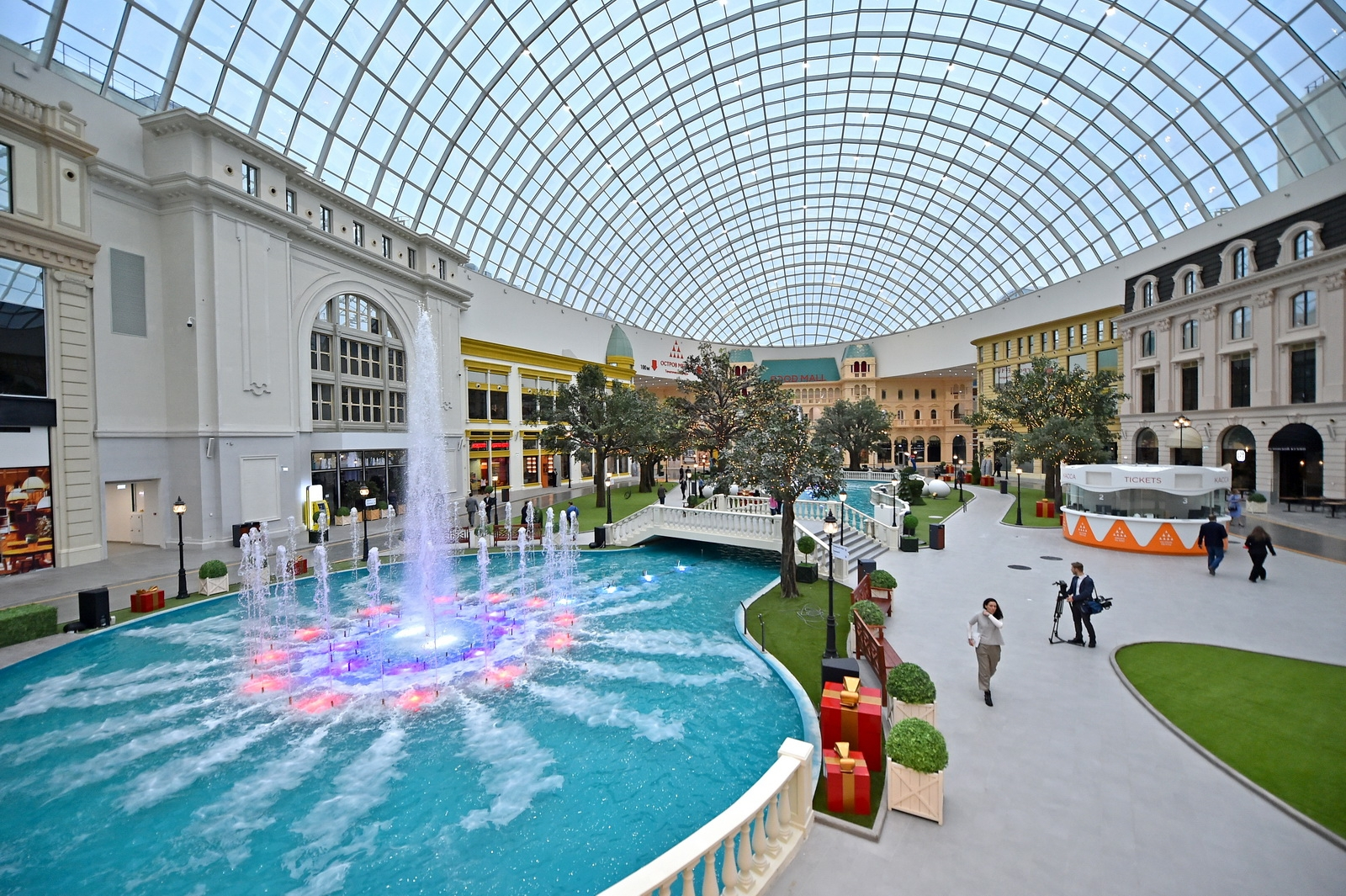 Владимир Путин и Сергей Собянин посетили новый парк развлечений «Остров Мечты»